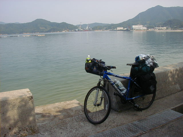 Michikajima (Shimanami Kaidoh)